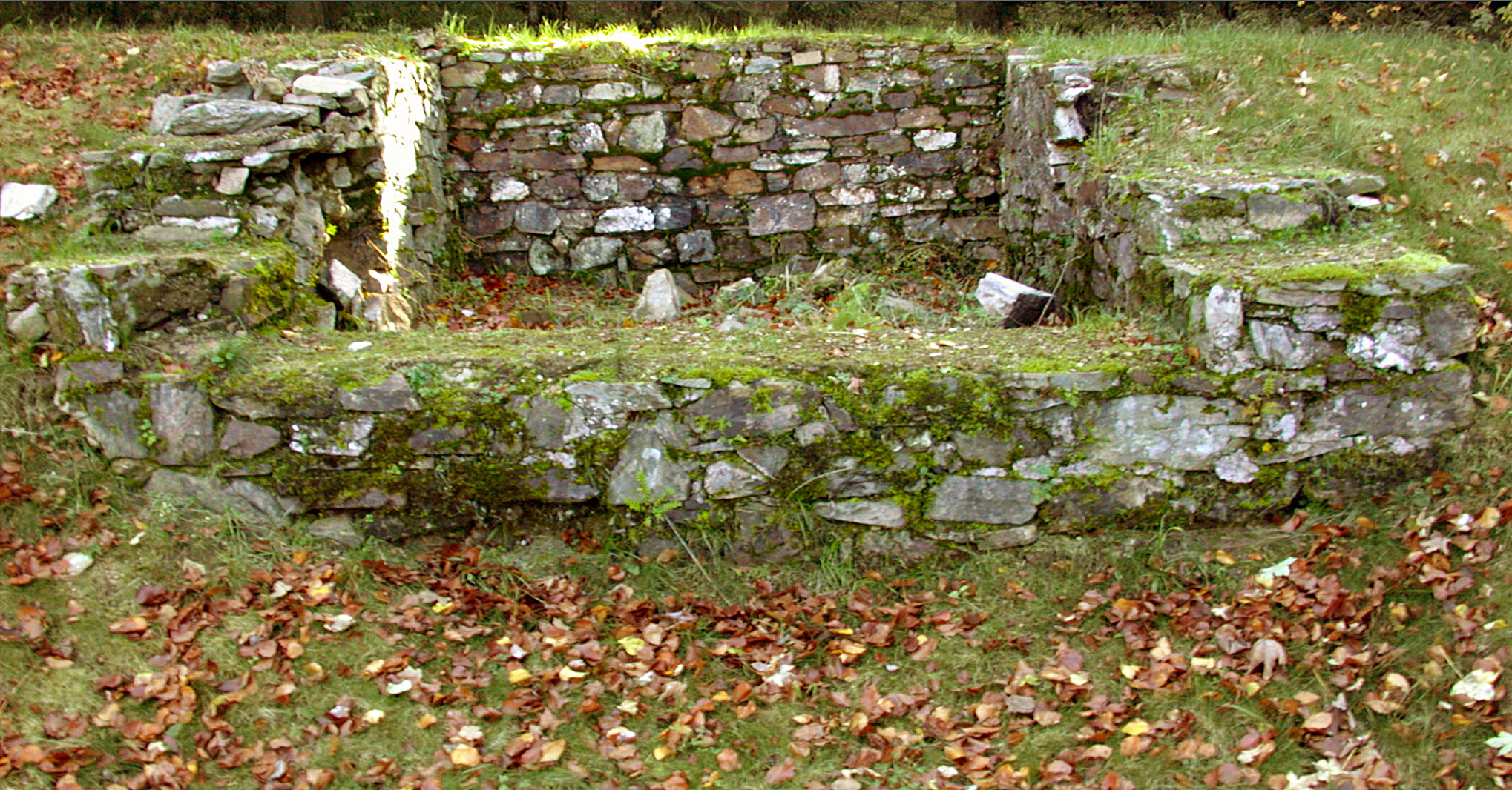 Südwestturm des Feldbergkastells, Deutschland